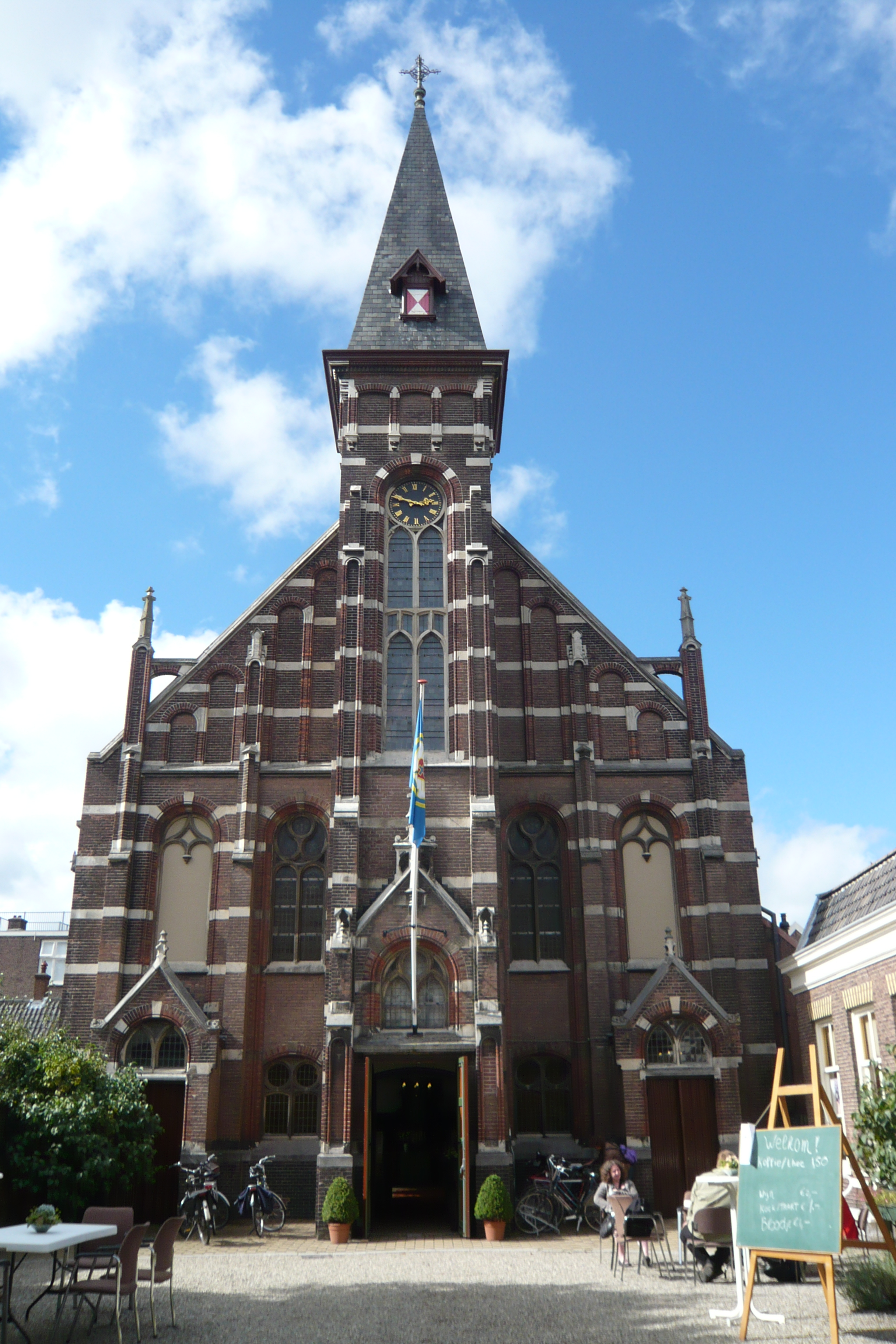 Lutherse kerk, Witte Herenstraat, Haarlem.